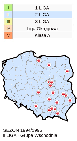 Jagiellonia w sezonie 1994/95 mapa